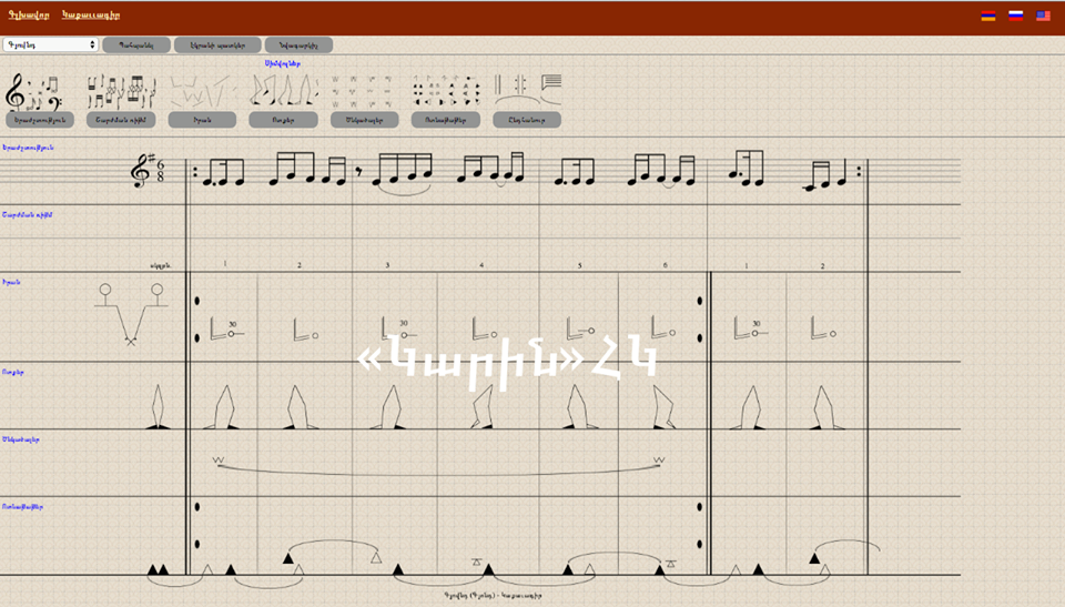 «Կաքավագիր» պարերի գրառման համակարգի ծրագիր